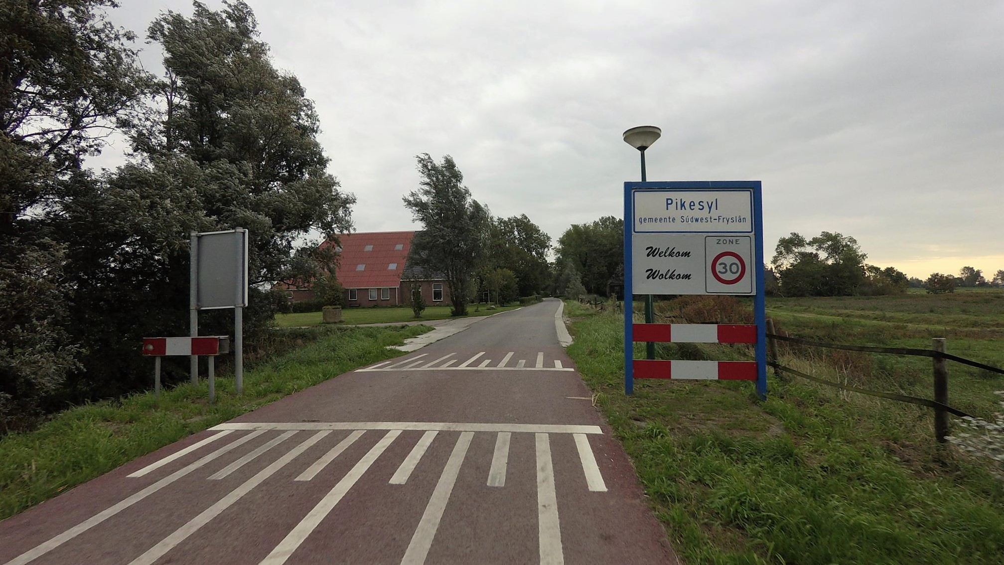 Pikesyl